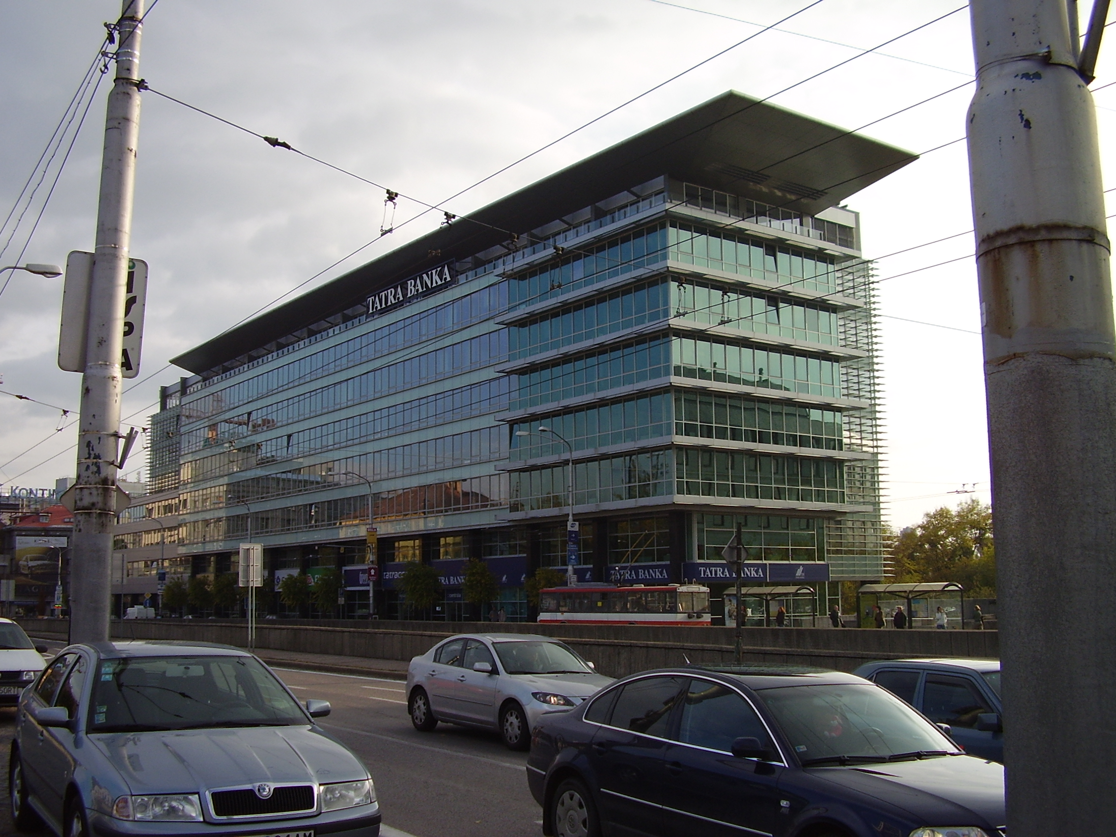 Tatracentrum at Hodžovo námestie in Bratislava